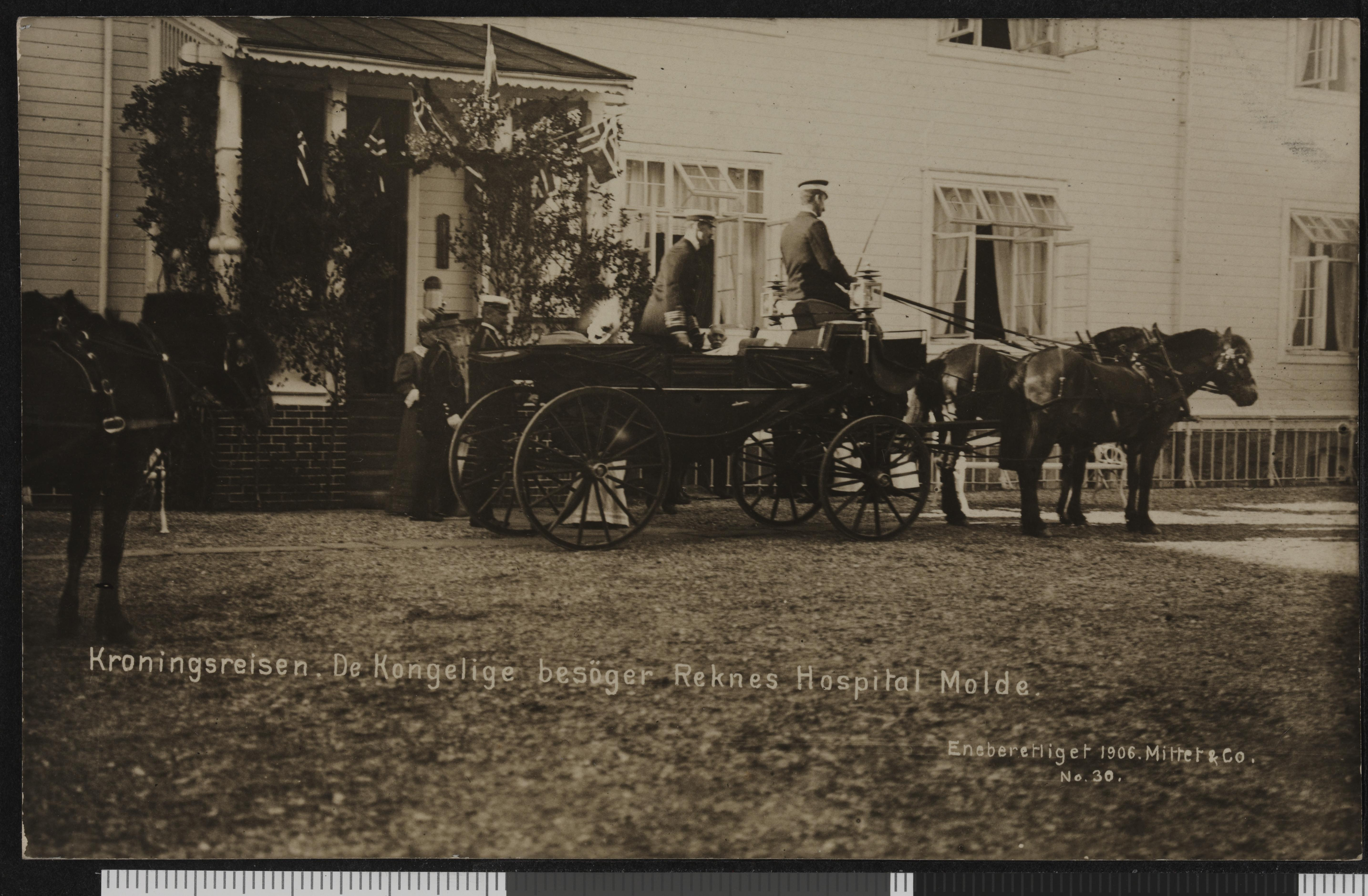 Bildet er hentet fra Nasjonalbibliotekets bildesamling Reknes, Molde, Møre og Romsdal Depicted person: Haakon VII konge av Norge Depicted person: Maud dronning av Norge